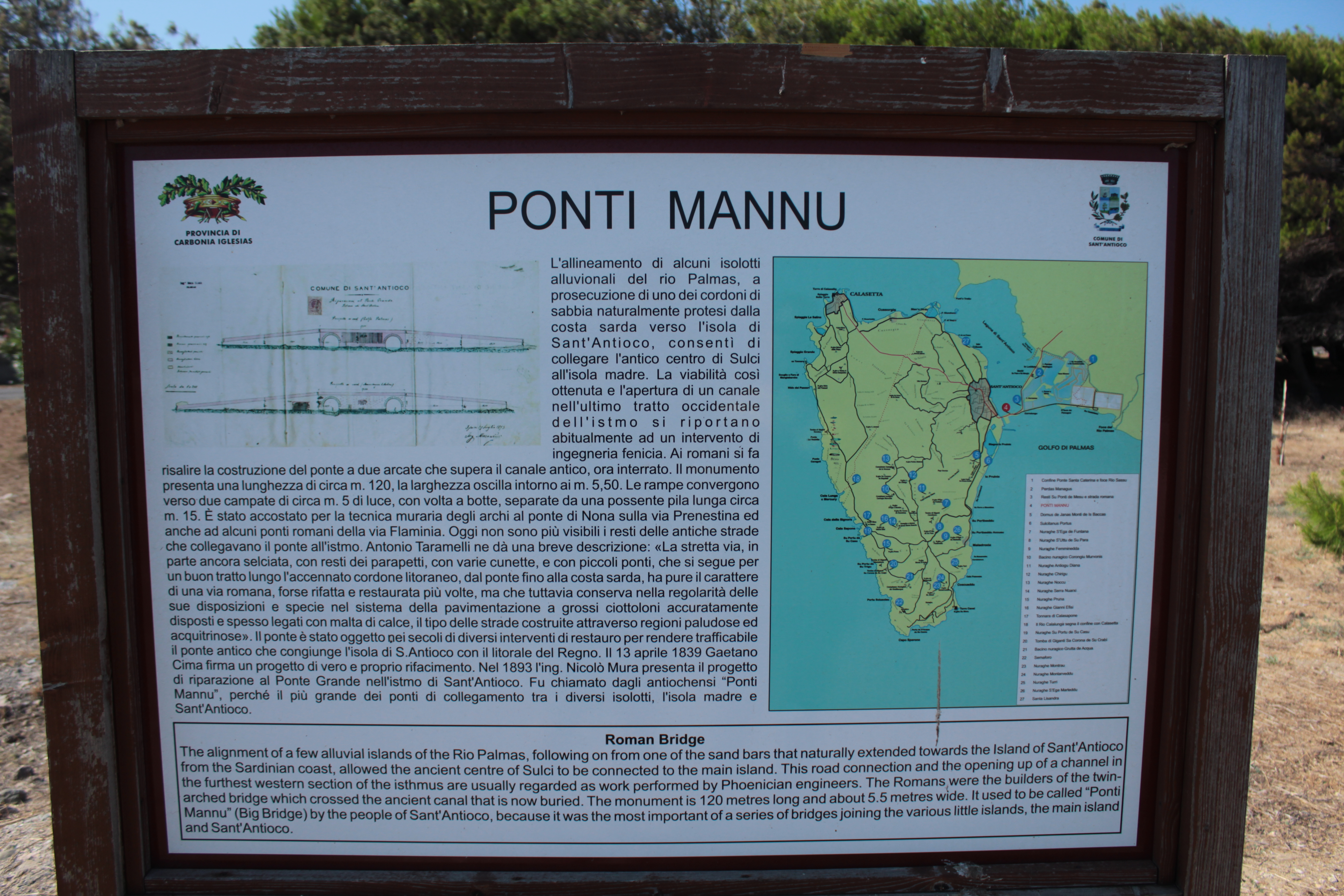 Ponti Mannu. Puente romano del Siglo II-III situado cerca de Sant'Antioco, Cerdeña (Italia)